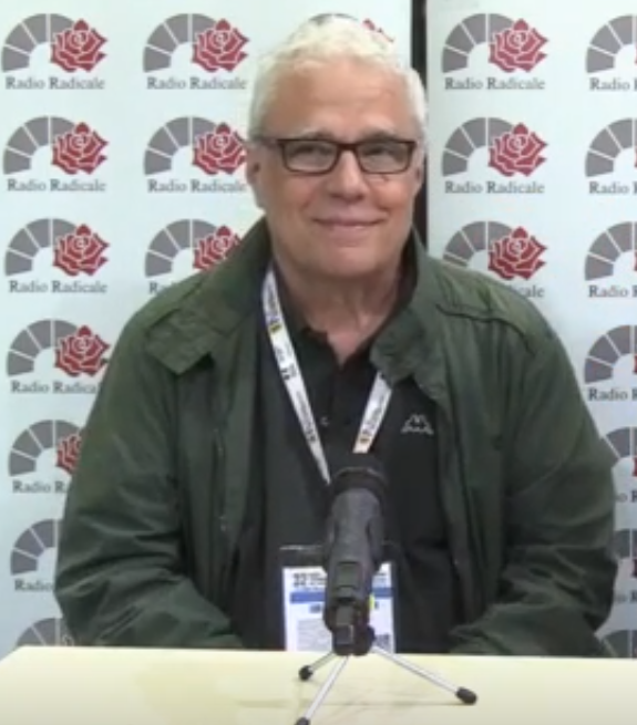 Darwin Pastorin durante l'intervista di Radio Radicale al Salone del Libro di Torino 2019 sul suo libro "Gaetano Scirea. Il gentiluomo" (Torino, 12/05/2019)